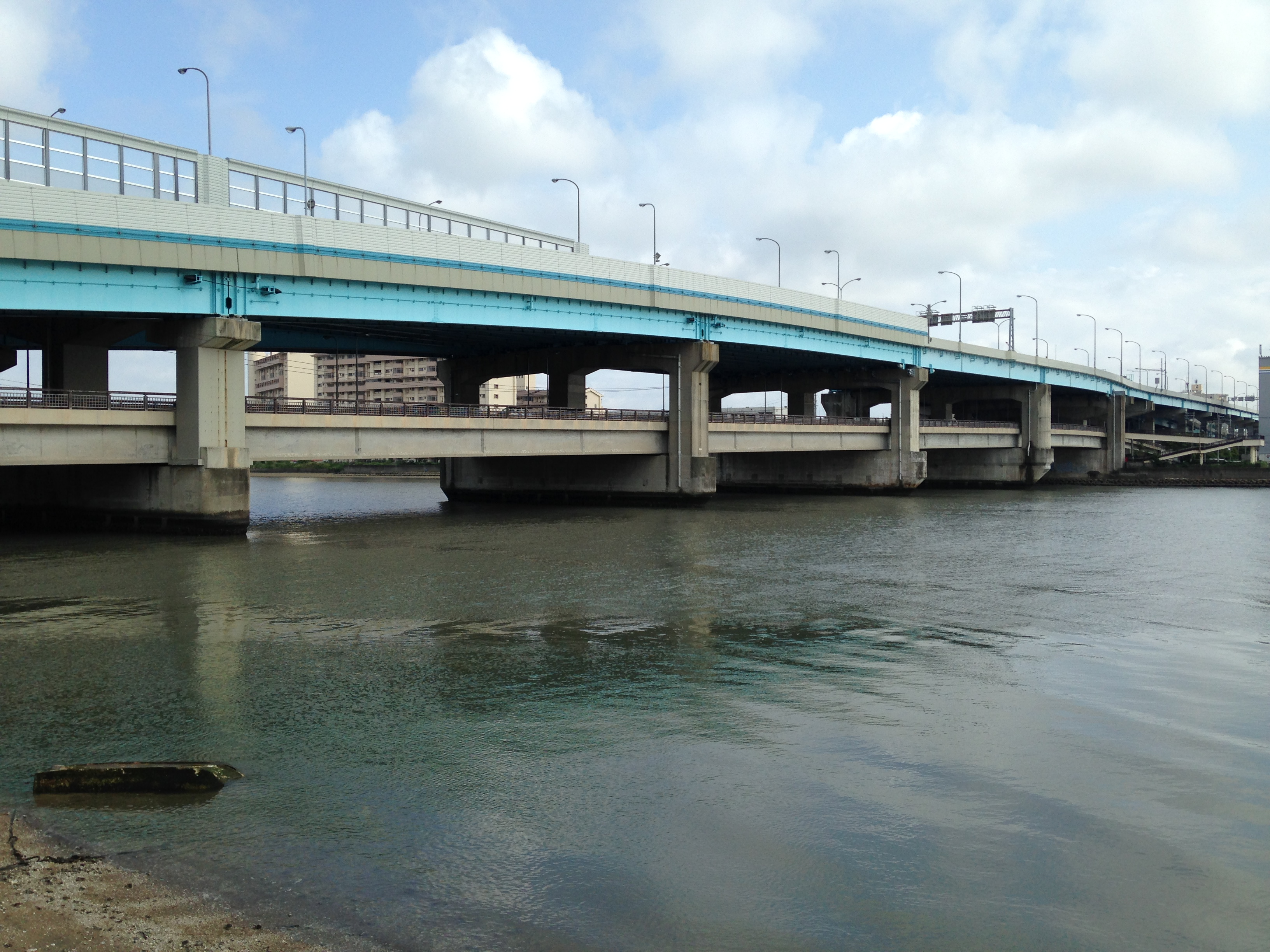 西側より望む名島弁天橋